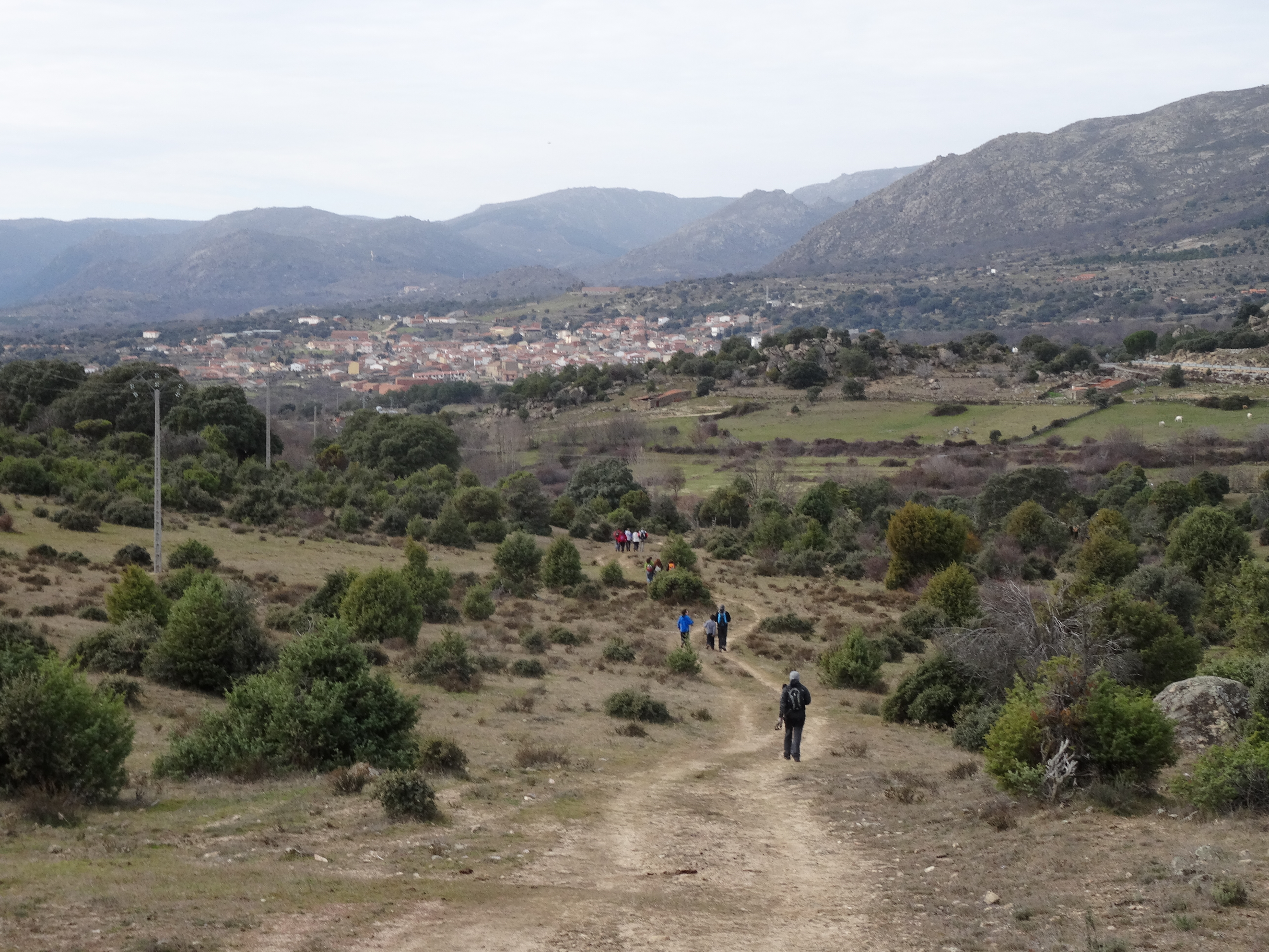 Desde el GR 10.3